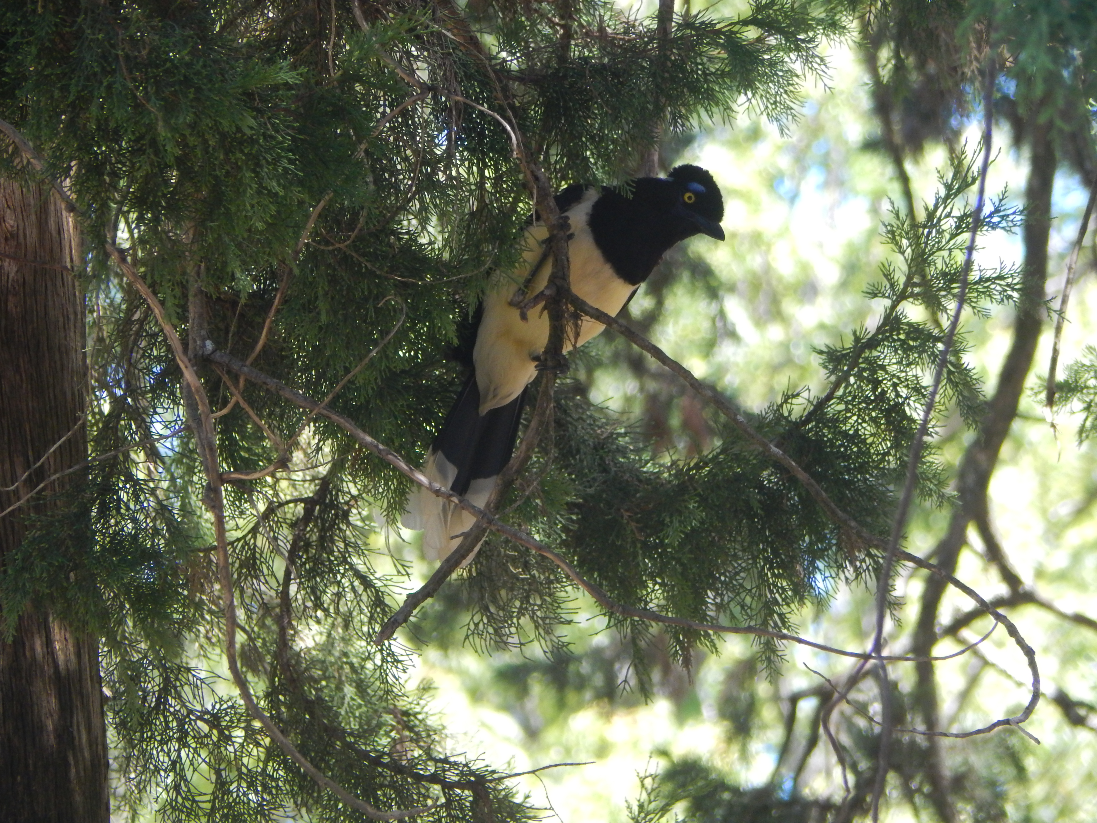 Ejemplar de urraca de cresta alborotada, urraca común o suso (Cyanocorax chrysops) en el Parque Nacional El Palmar, provincia de Entre Ríos, Argentina.